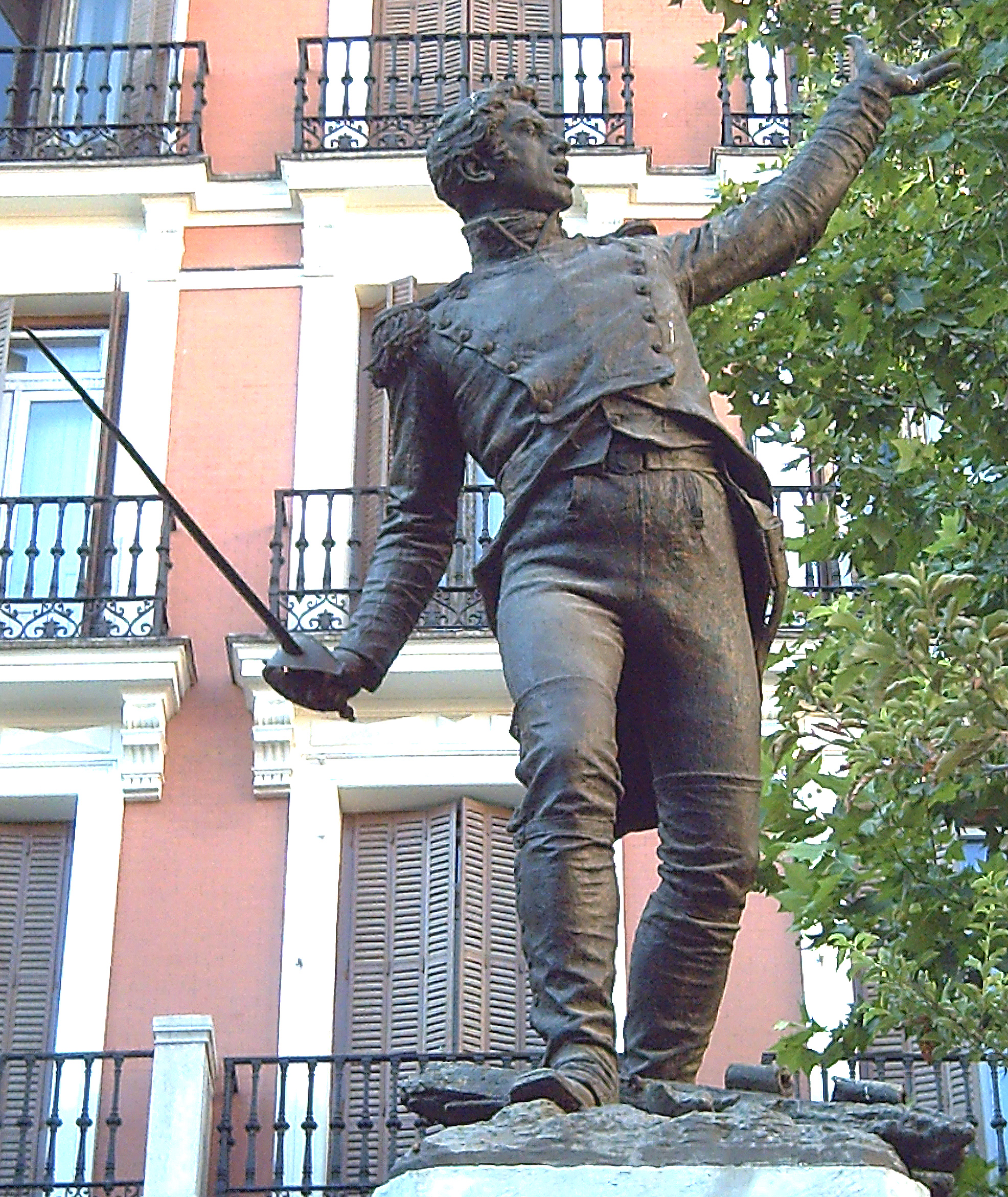 Monument to Jacinto Ruiz y Mendoza